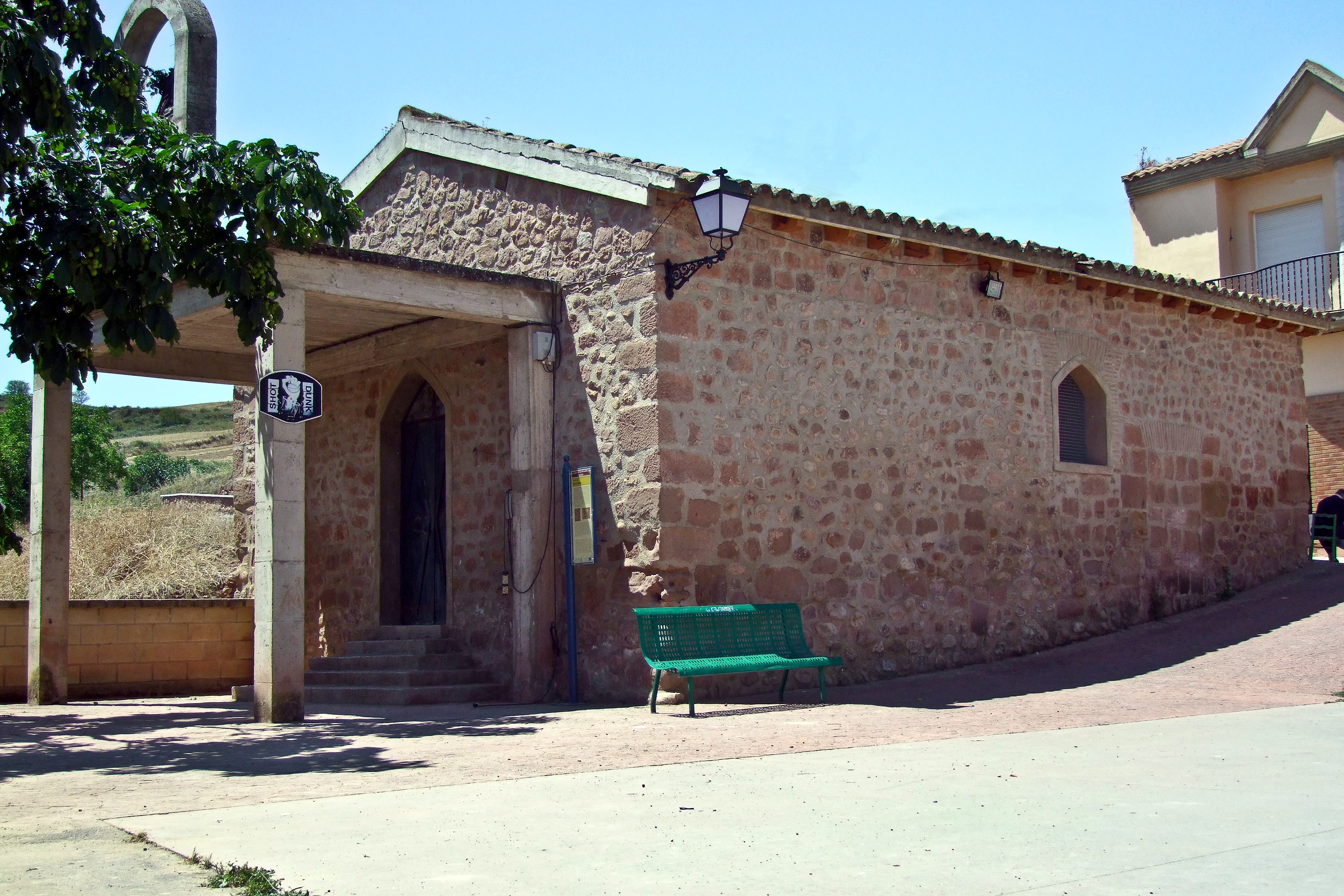 Ermita de San Roque en la localidad de Bezares, La Rioja - España